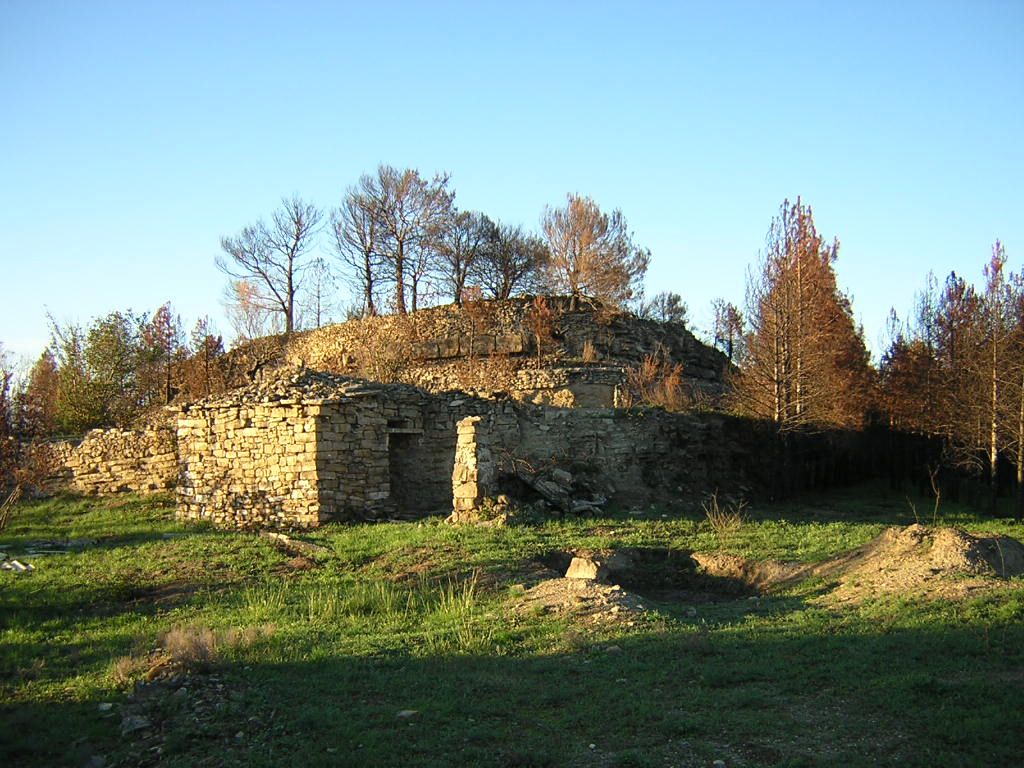 El Serrat del Llogari (Monistrol de Calders, Moianès)